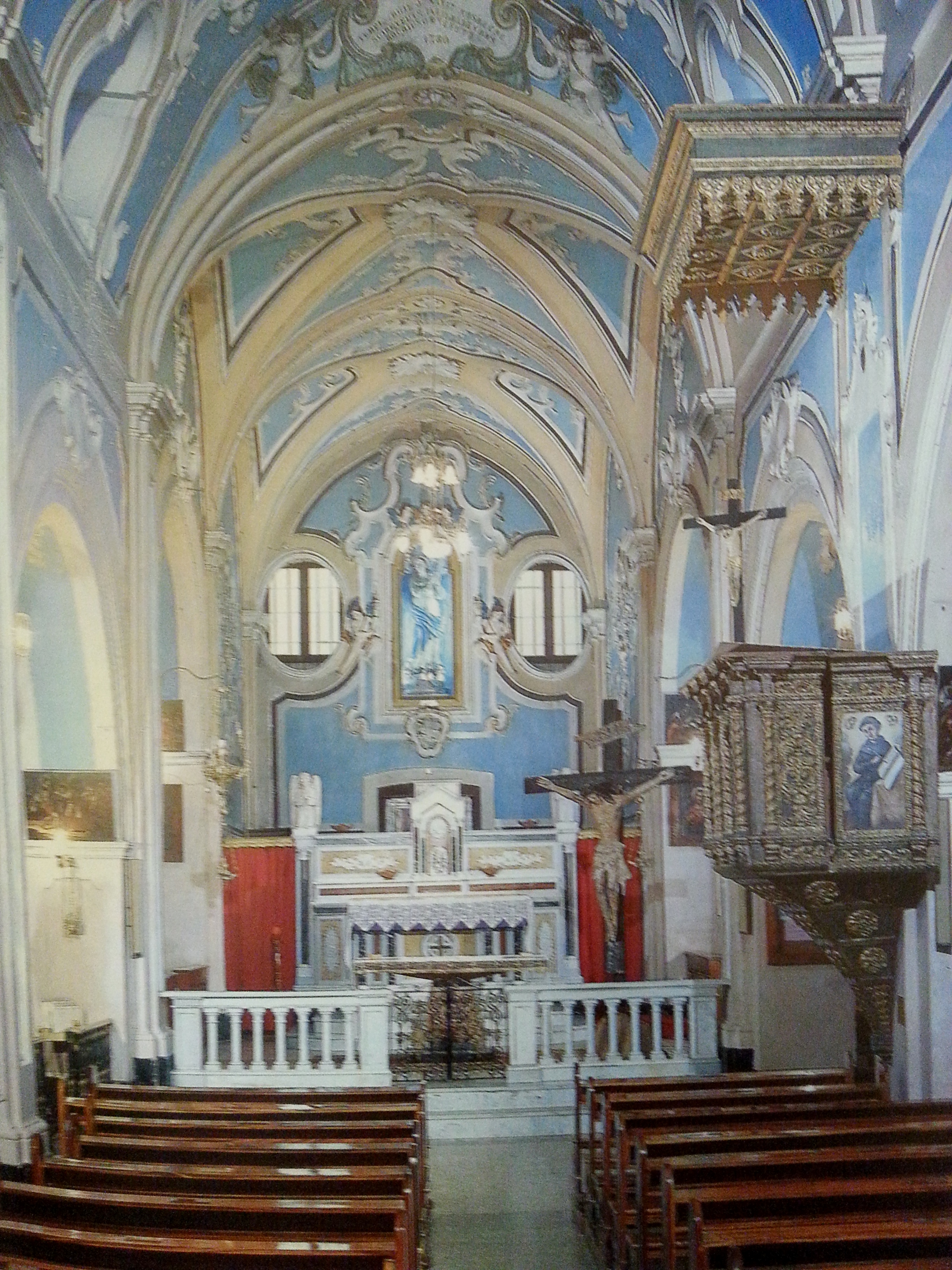 Nico d.s.,interno chiesa sant'antonio